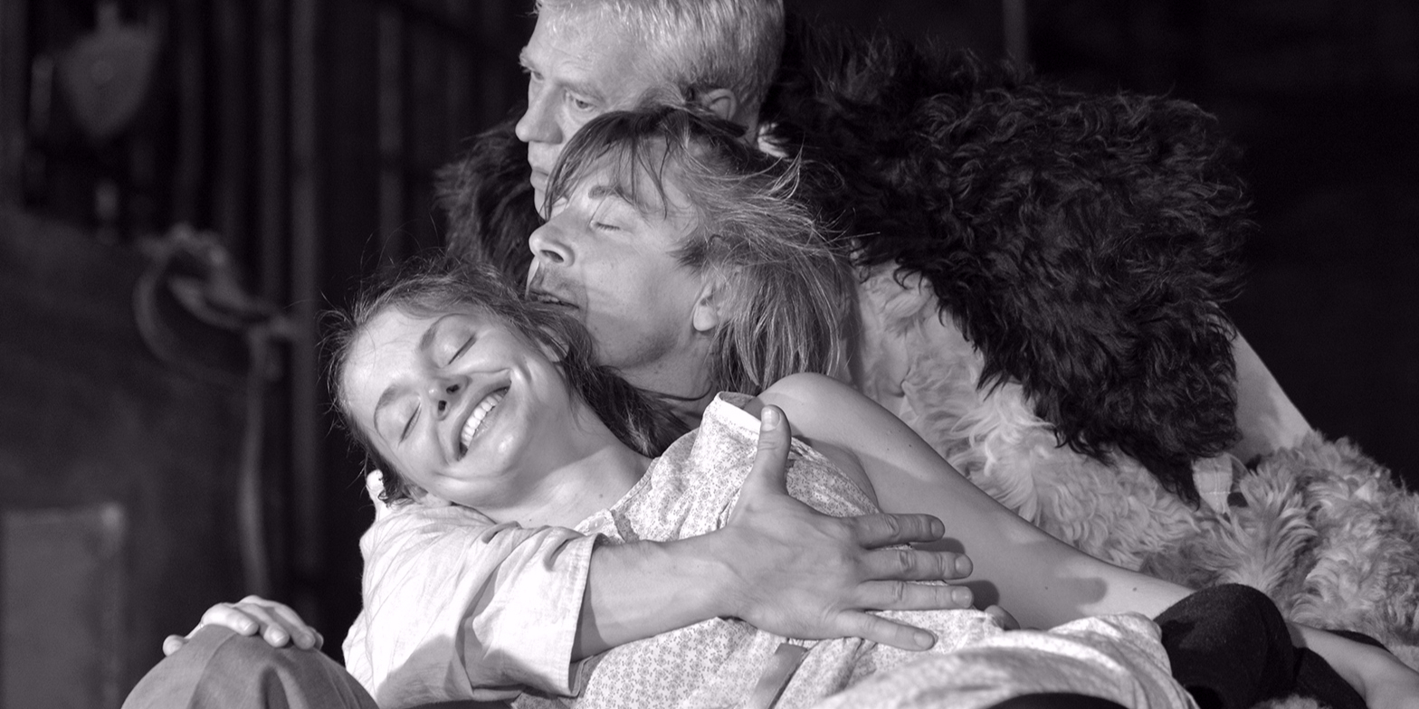 Постановка "Леди Макбет нашего уезда" в Московском театре юного зрителя, 2017 год.